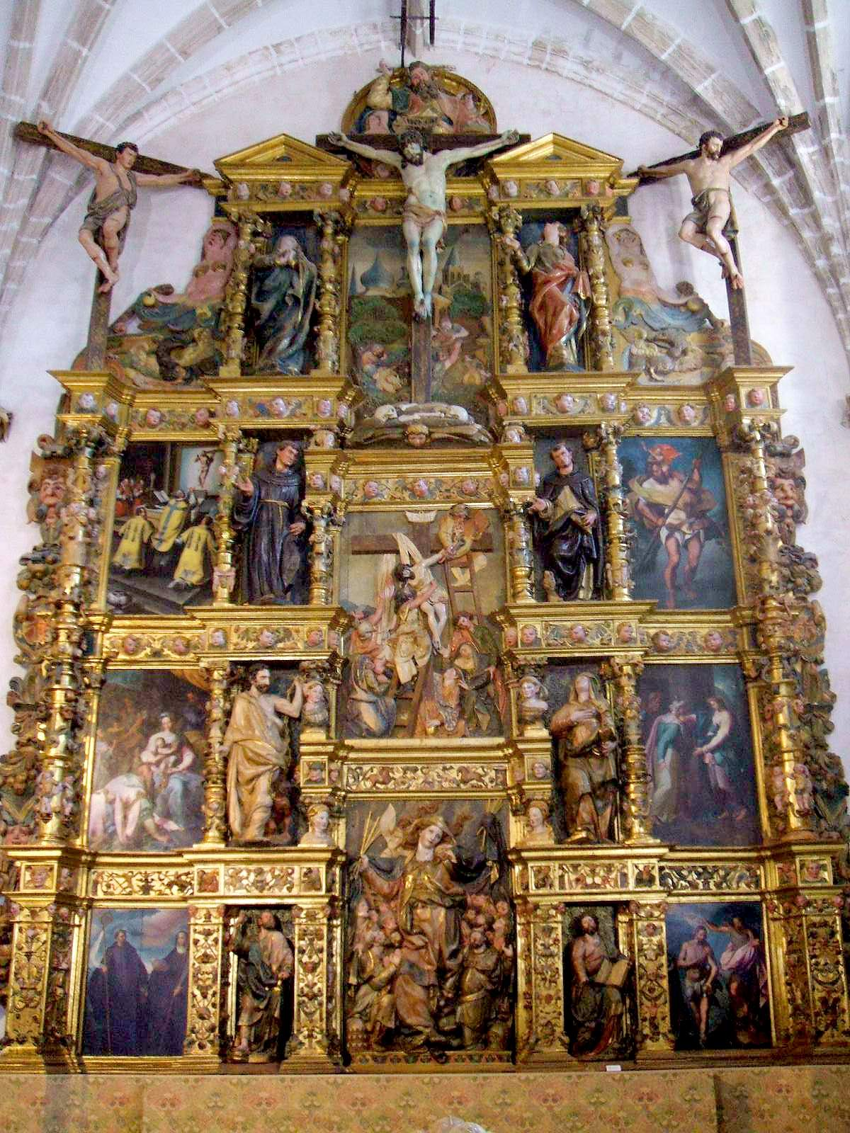 Iglesia-Museo de San Antolín, Tordesillas (Valladolid)